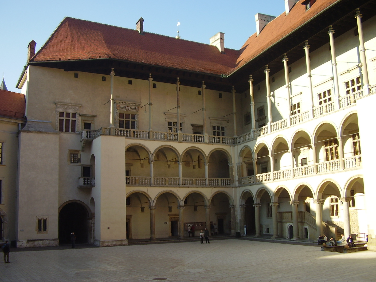 Krakow